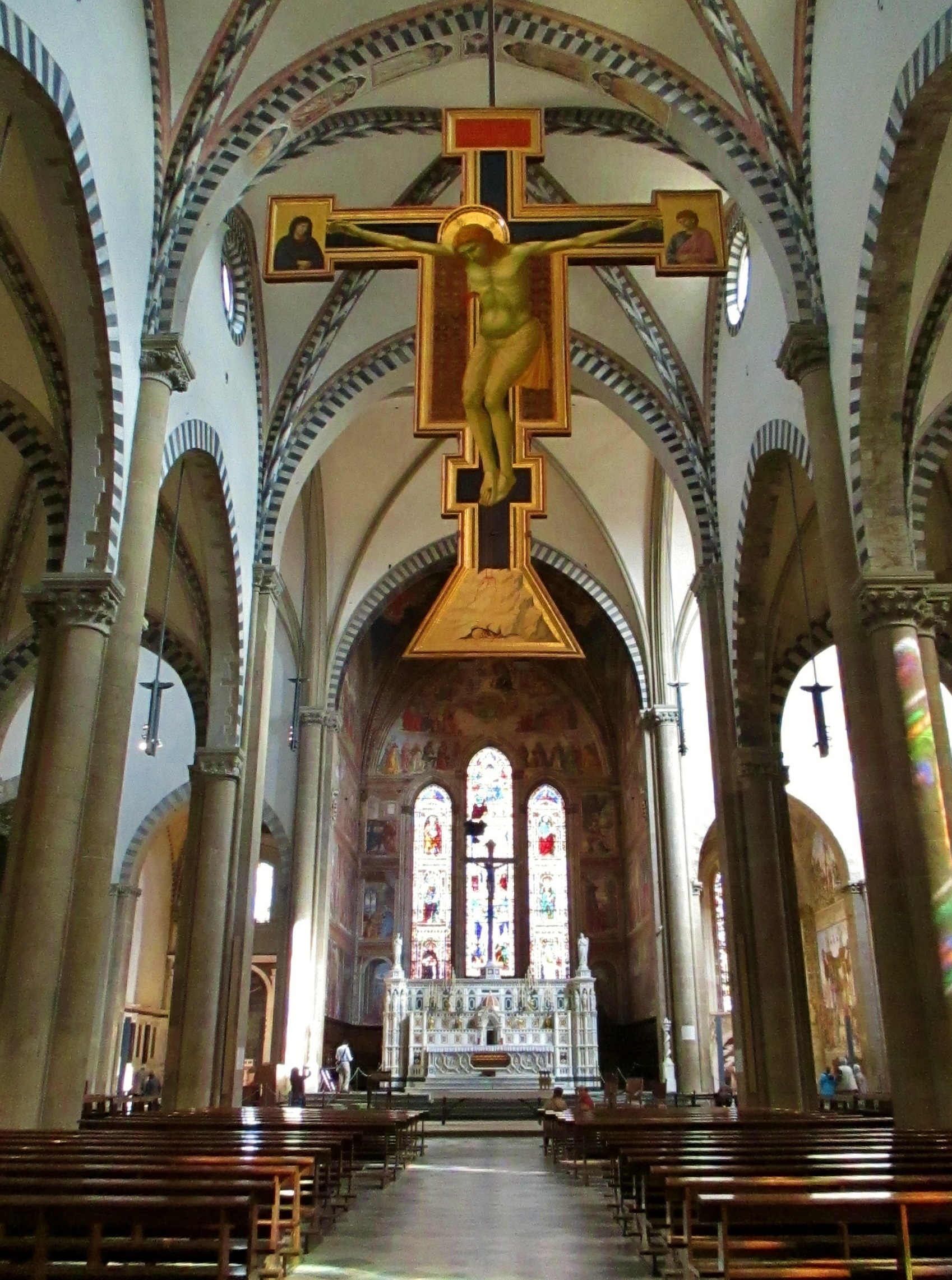 Firenze, Santa Maria Novella, interno e crocifisso di Giotto